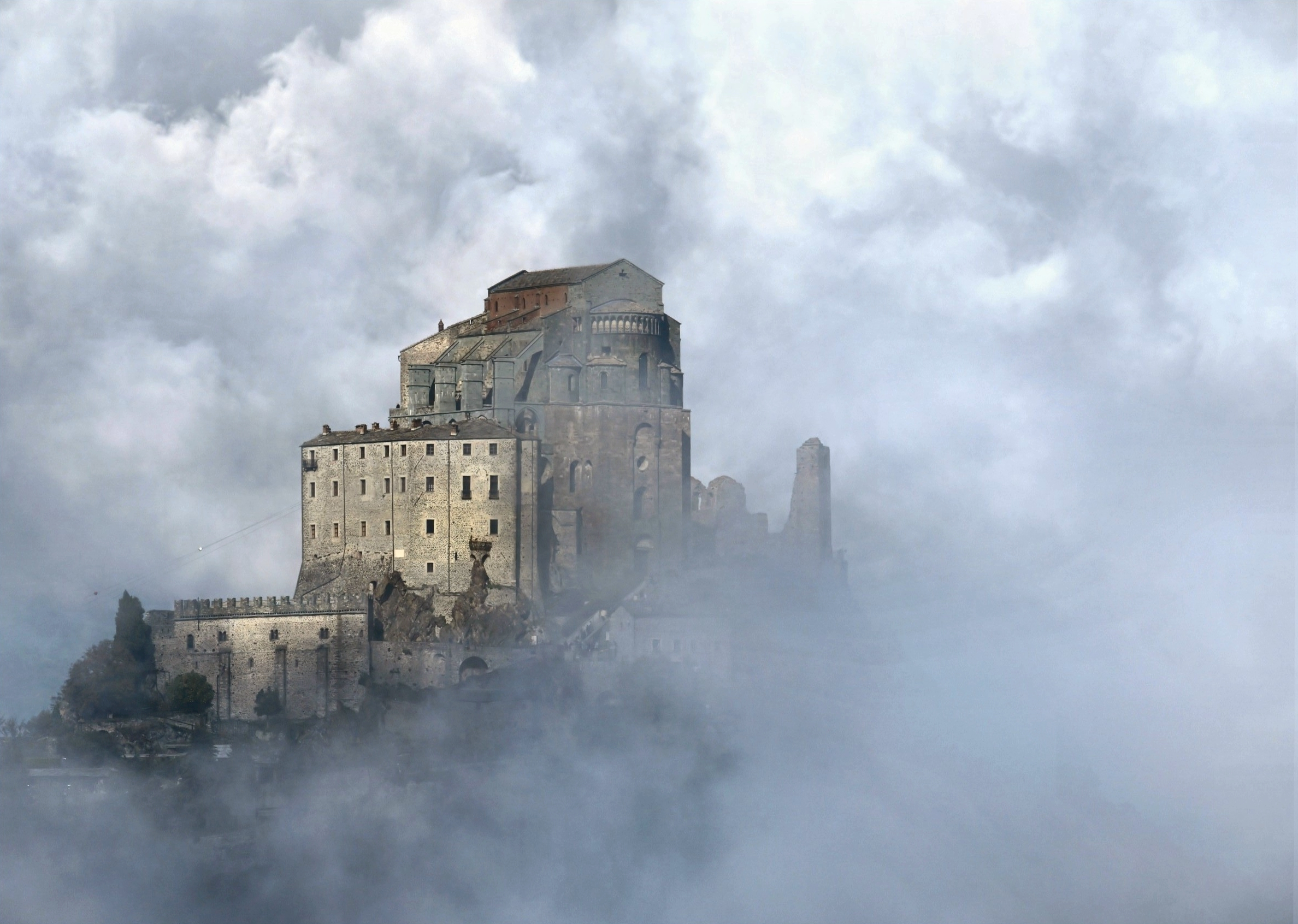 Sacra di San Michele This is a photo of a monument which is part of cultural heritage of Italy.